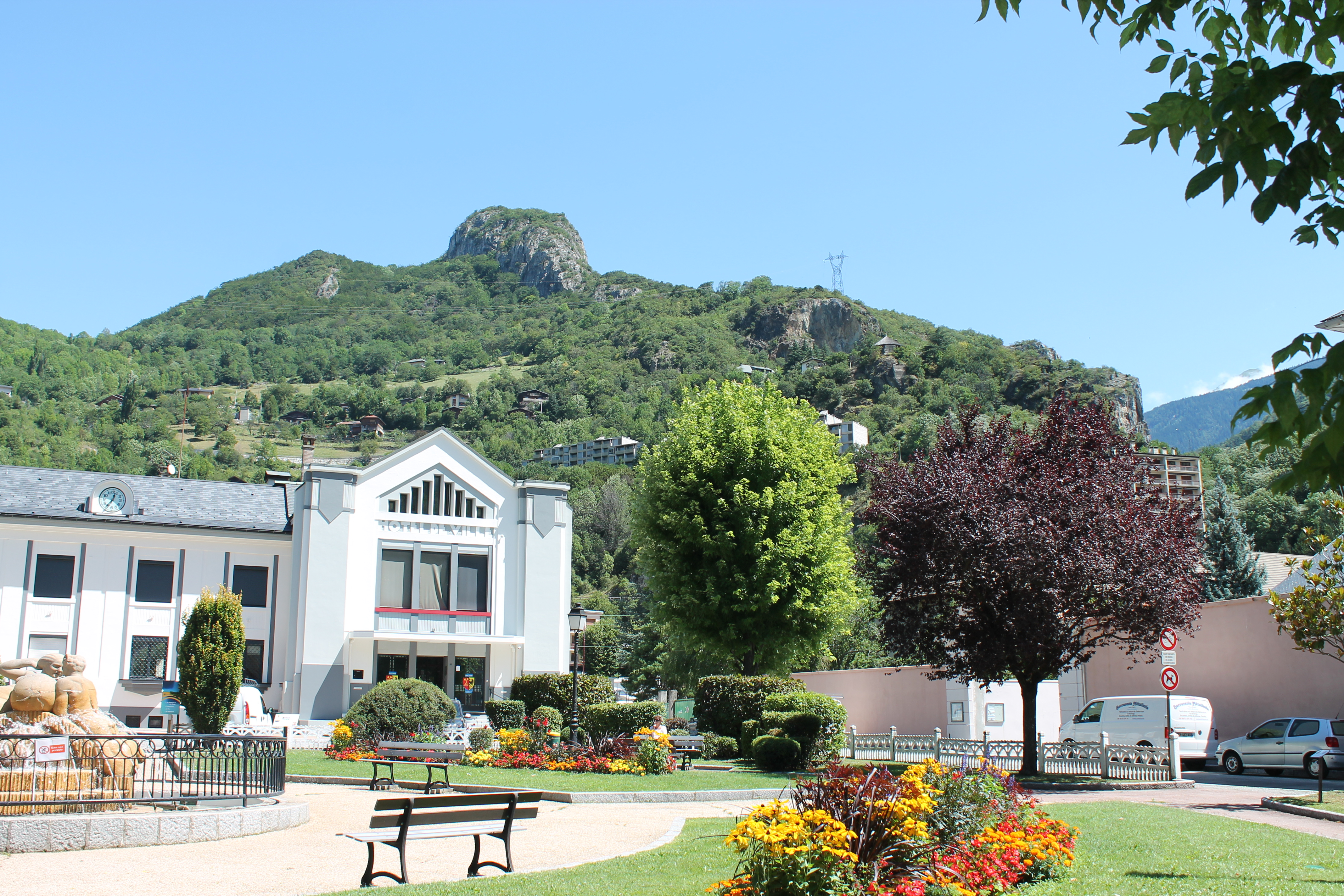 Hôtel de ville de Moûtiers et jardin.